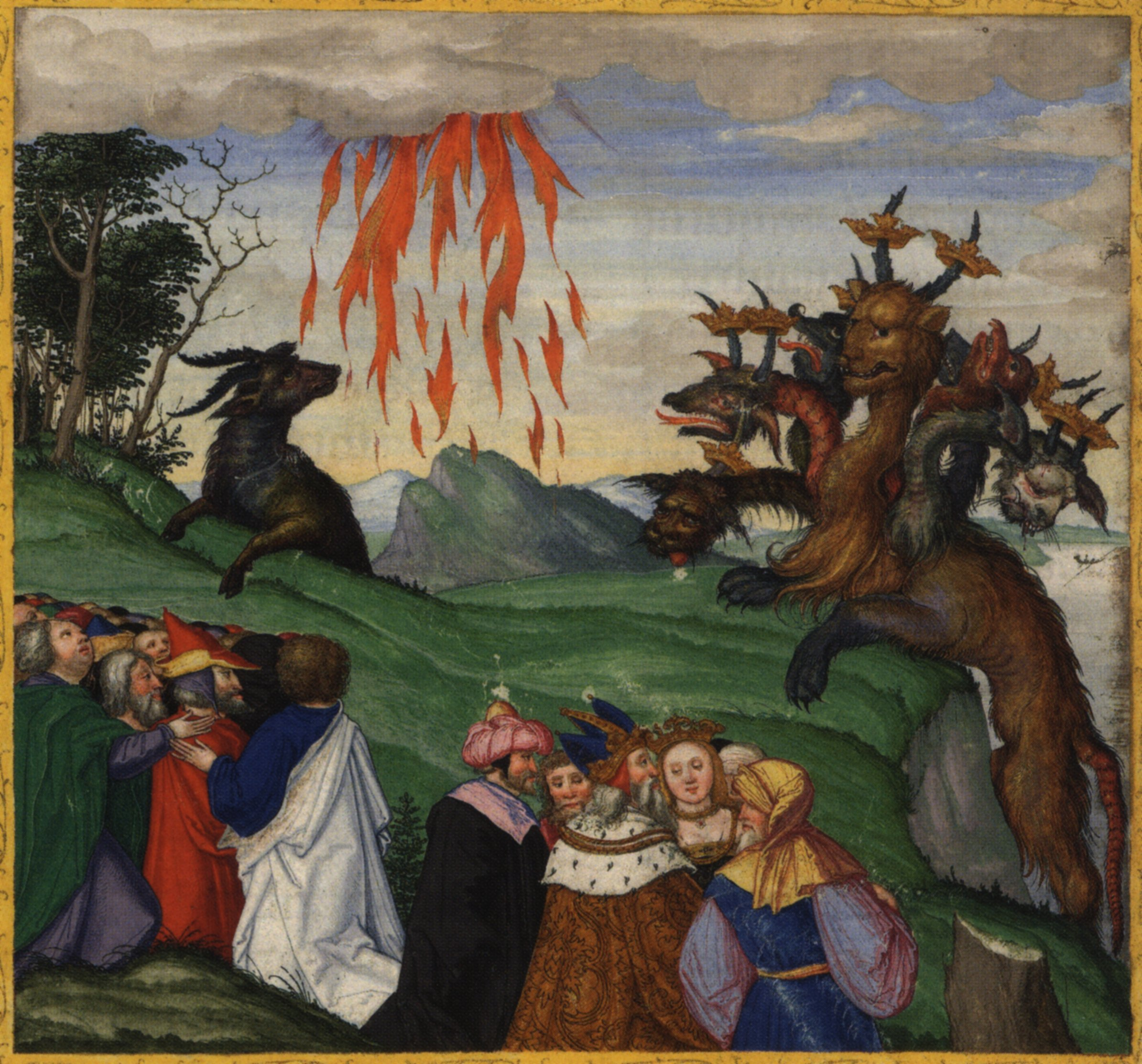 Blatt 296r: Das Tier mit den zehn Hörnern und das Tier mit den Lammshörnern, Offb 13,1-18